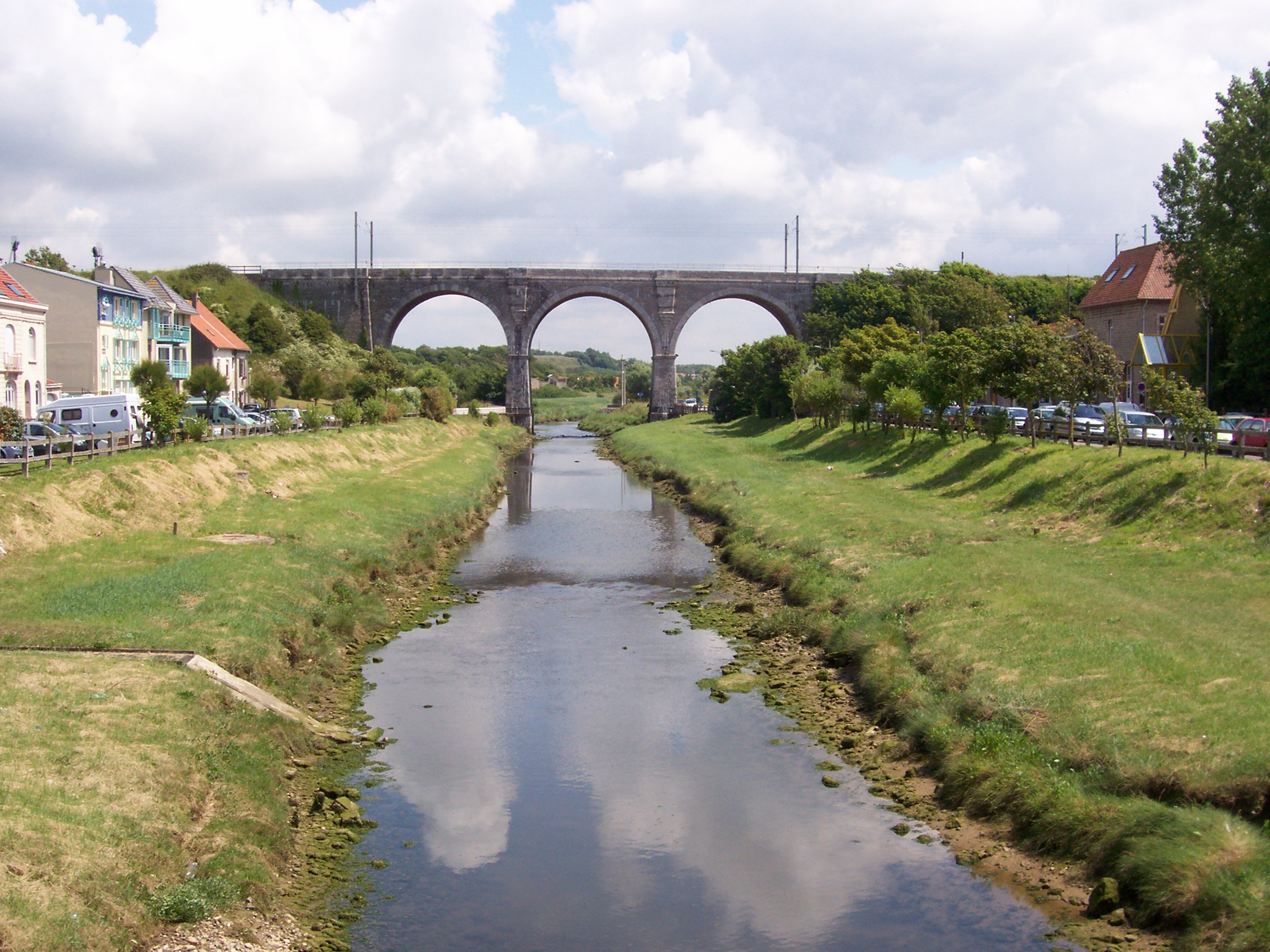 WIMEREUX [France, département du Pas de Calais] — Fleuve côtier "le Wimereux". Cliché donnant sur le viaduc et prise à environ 400 mètres de la plage située au dos du photographe.